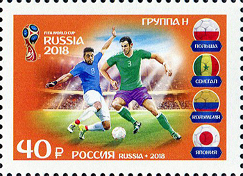 Группа Н.